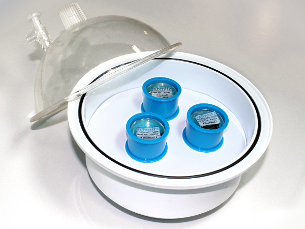 Kalteingebettete Proben der Schmitz-Metallographie GmbH im offenen Exsikkator mit Etikett